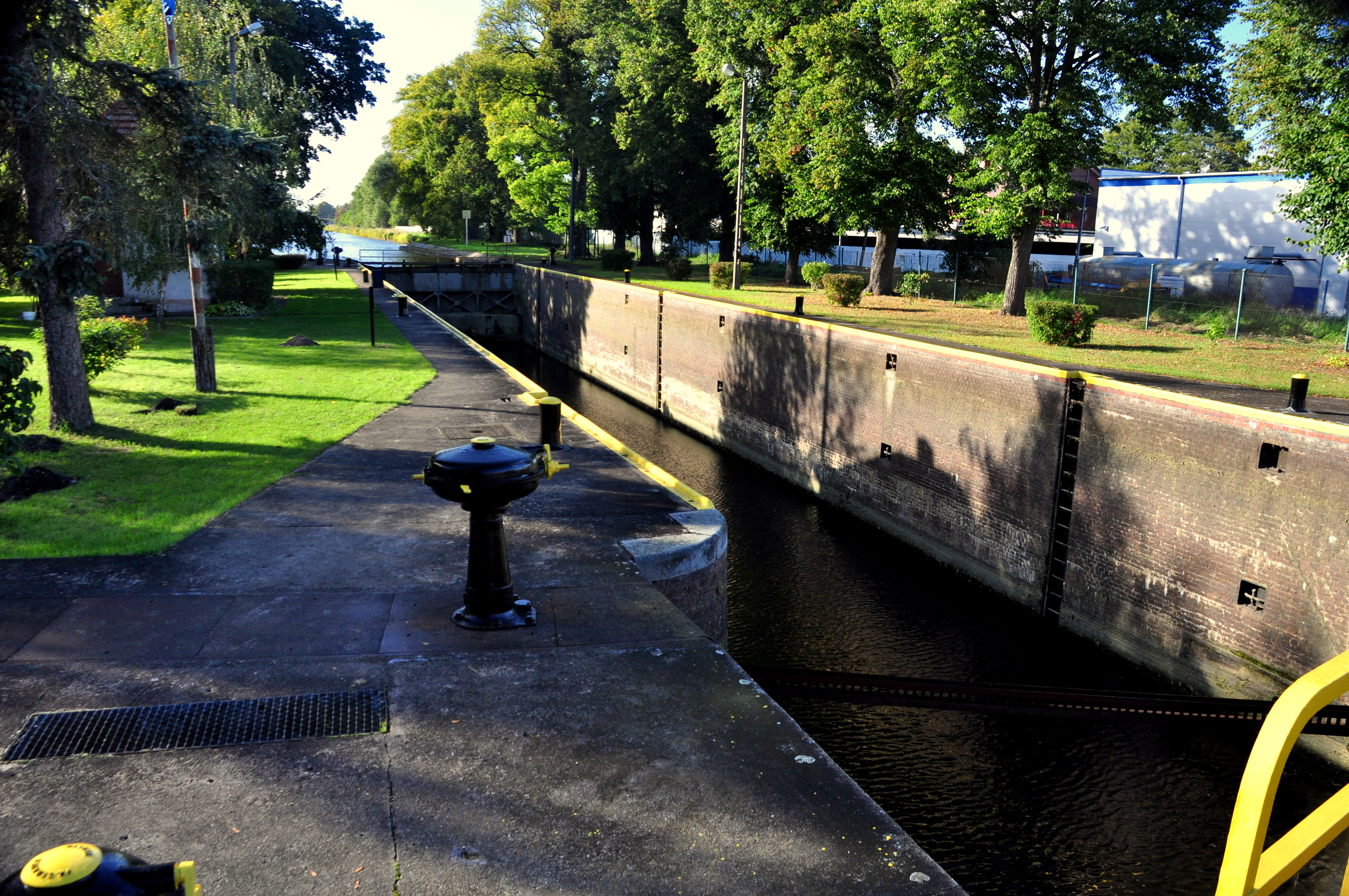 Bydgoszcz, śluza V, 1910-1914